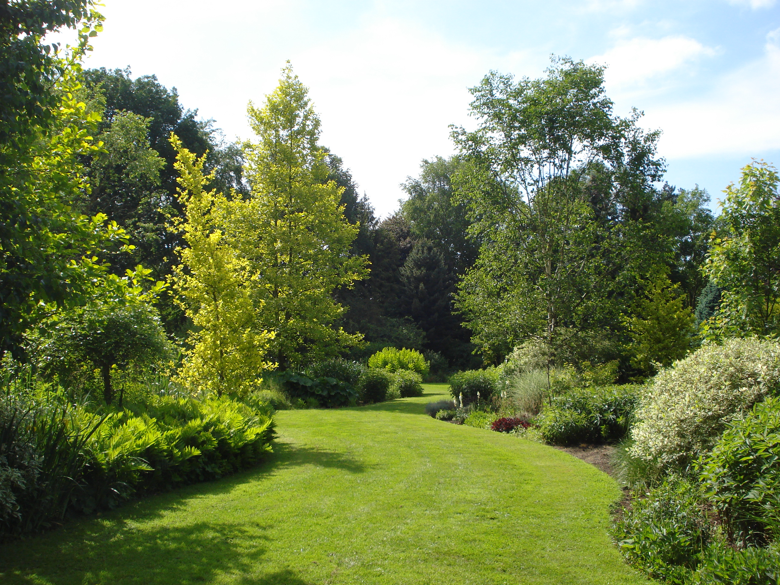 Bressingham Steam and Gardens